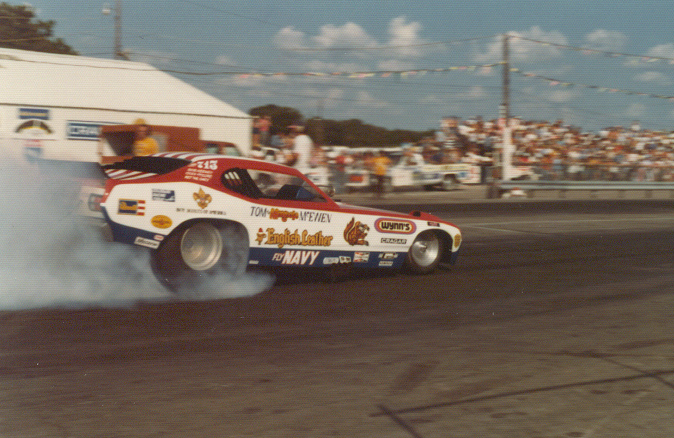 Tom McEwen dragster, Green Valley 1975Tom McEwen